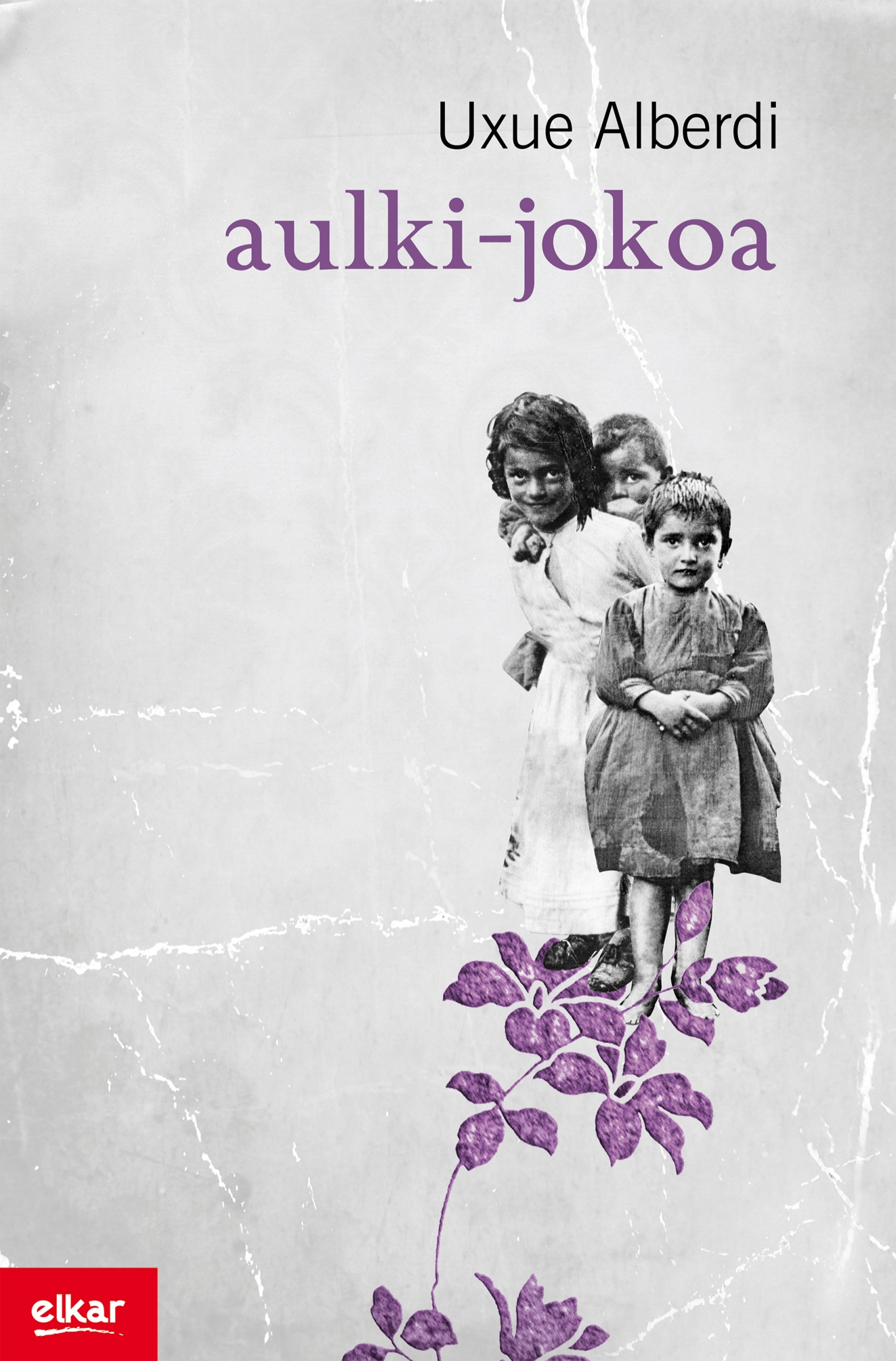 "Aulki-jokoa" liburuaren azala. Idazlea: Uxue Alberdi. Azala: Juanma Aramendi. Argazkia: Felipe Manterola ("Undurraga auzoko haurrak" moldatuta). Sailaren diseinua: Borja Goitia.